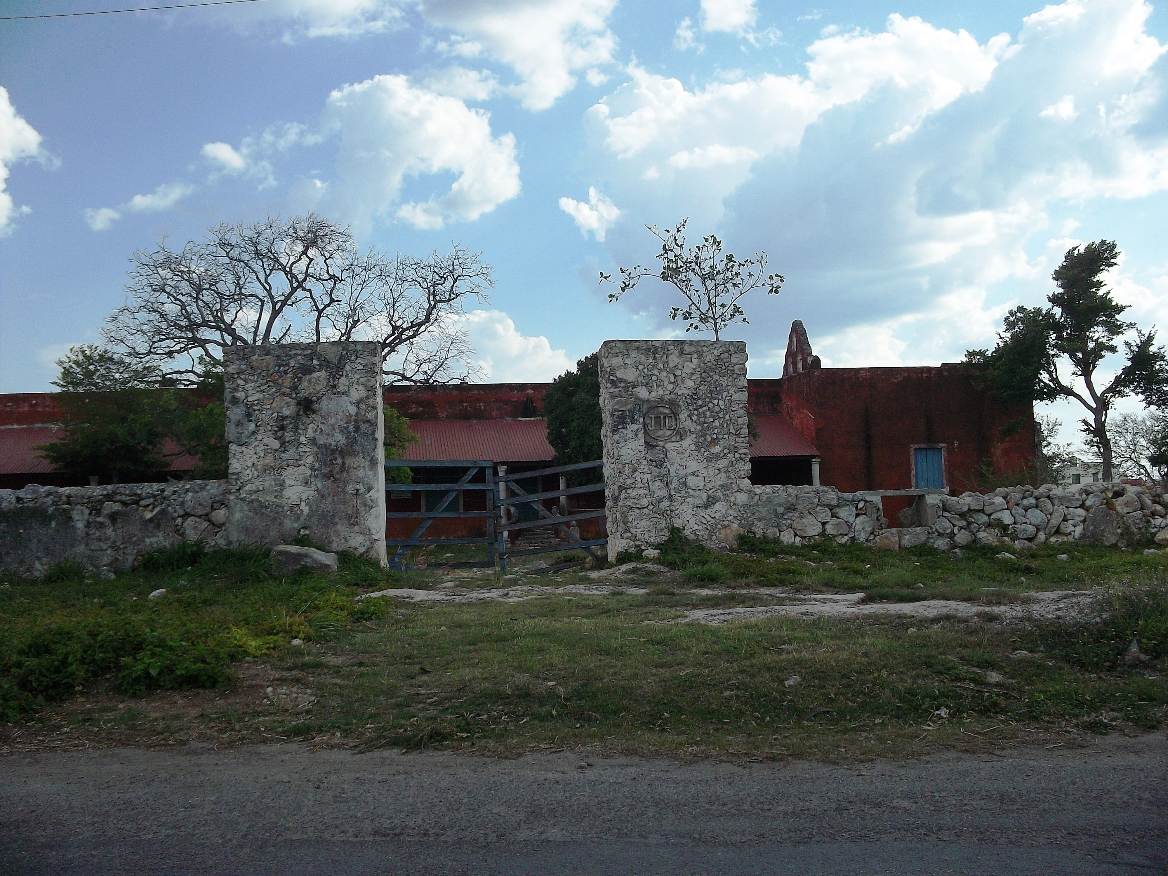 Opichén, Yucatán.